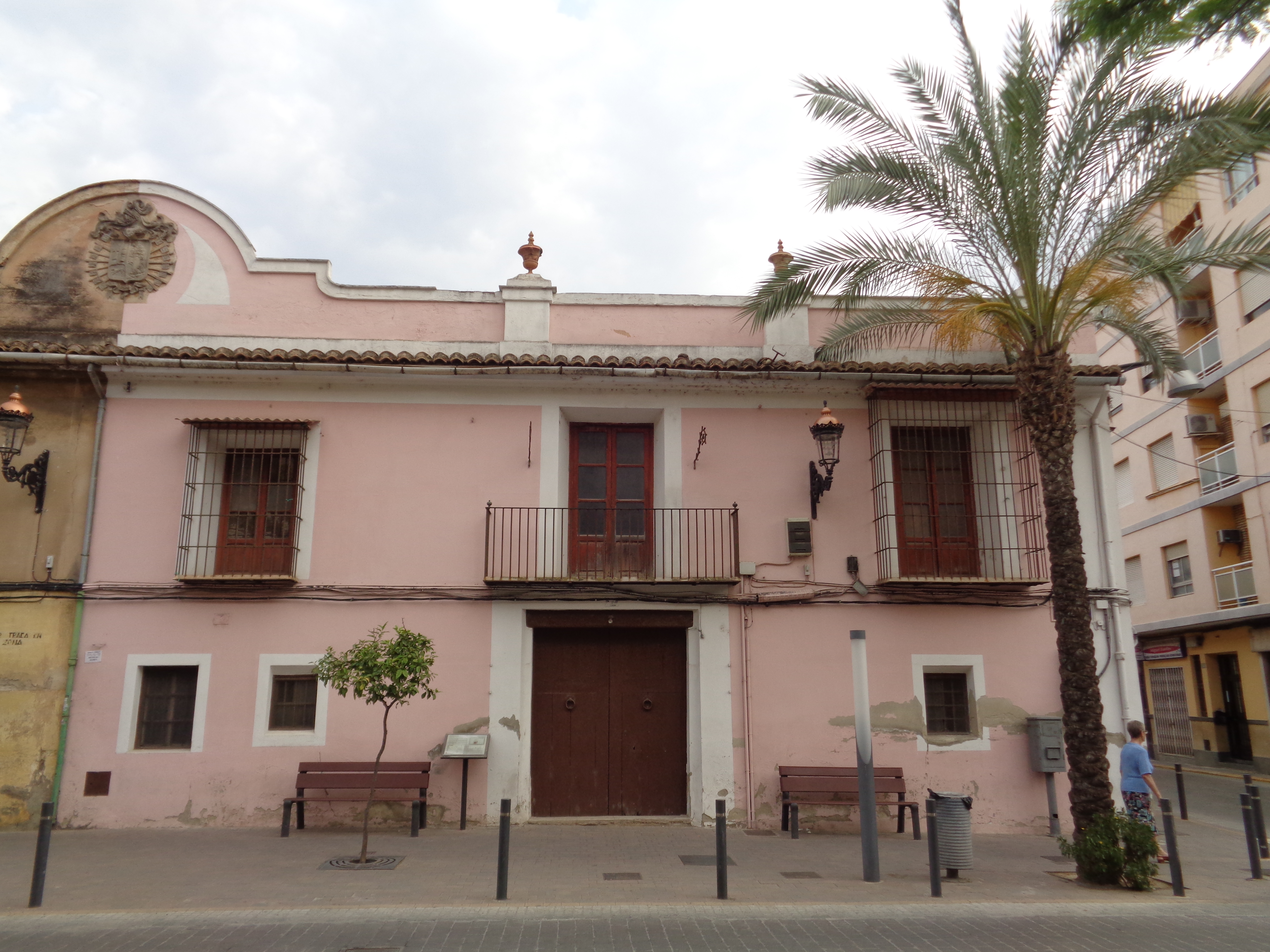 La Pobla de Vallbona.